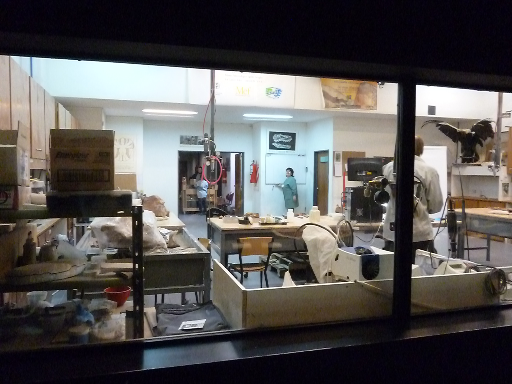 Laboratorio del Museo Feruglio